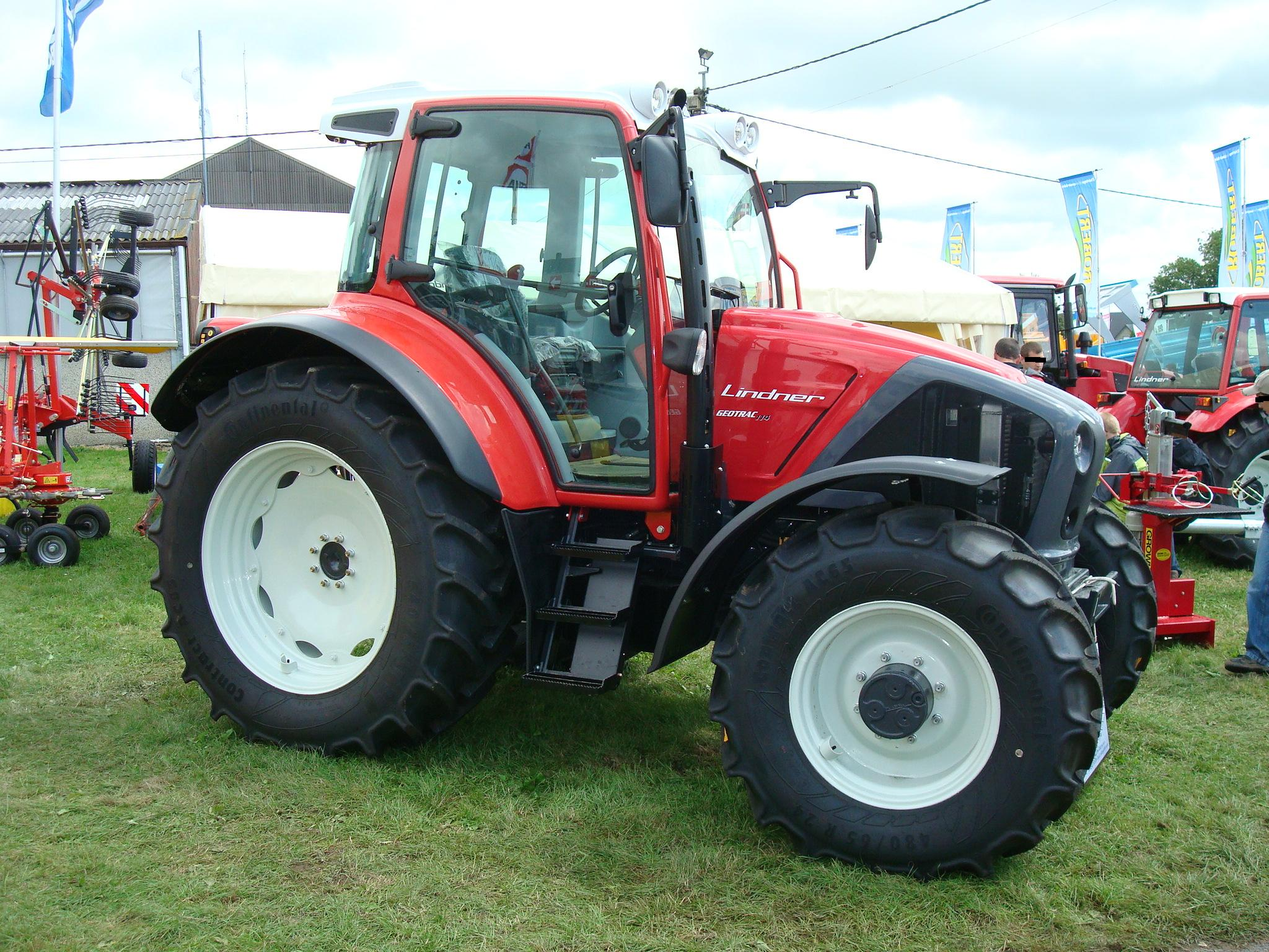 Lindner Geotrac 114